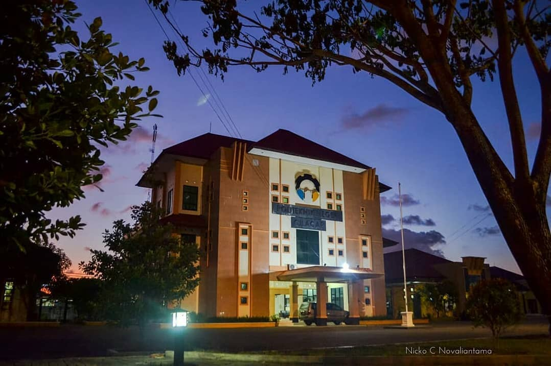 Merupakan satu-satunya perguruan tinggi negeri yang ada di Kabupaten Cilacap